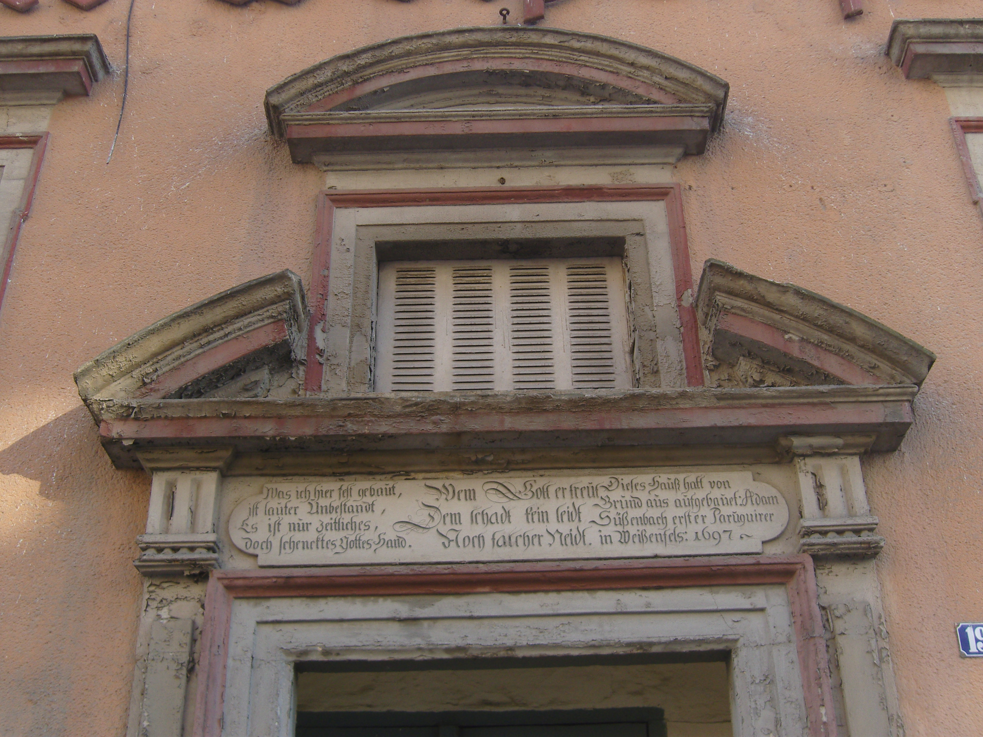 Detail am denkmalgeschützten Gebäude in Weißenfels in der Großen Burgstraße 19